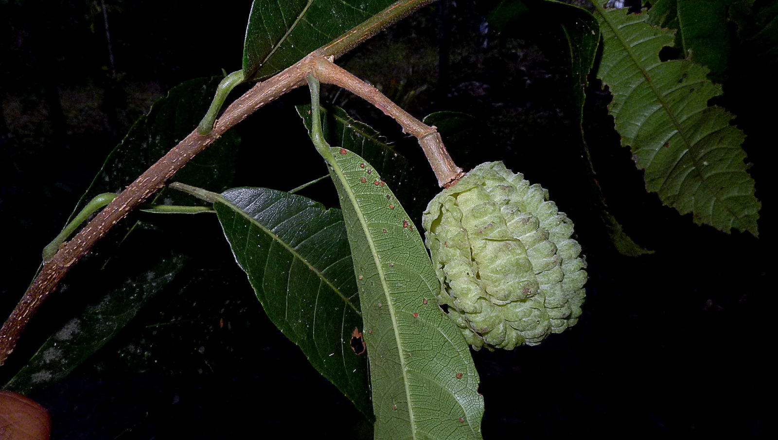 Carpotroche brasiliensis (Raddi) Endl.